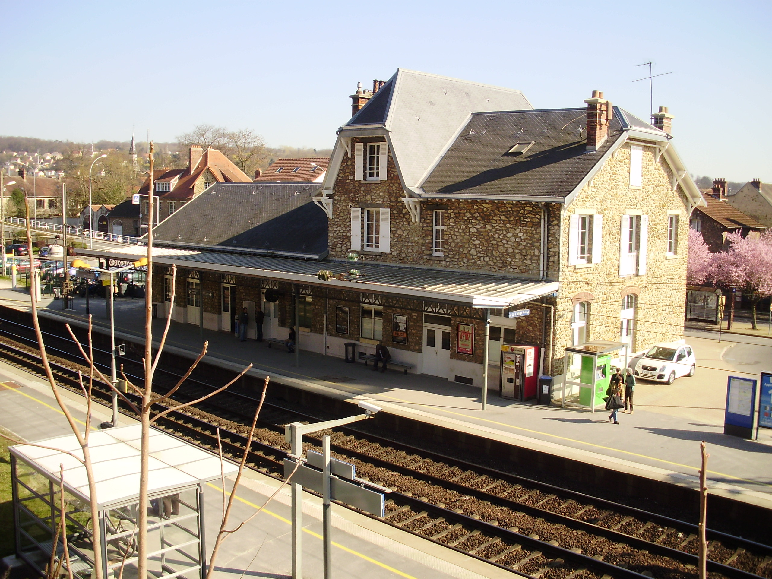 Gare de La Ferté-sous-Jouarre, Seine-et-Marne, France (Bâtiment voyageurs vu en surplomb depuis la rue Duburcq Clément, au nord de la gare)